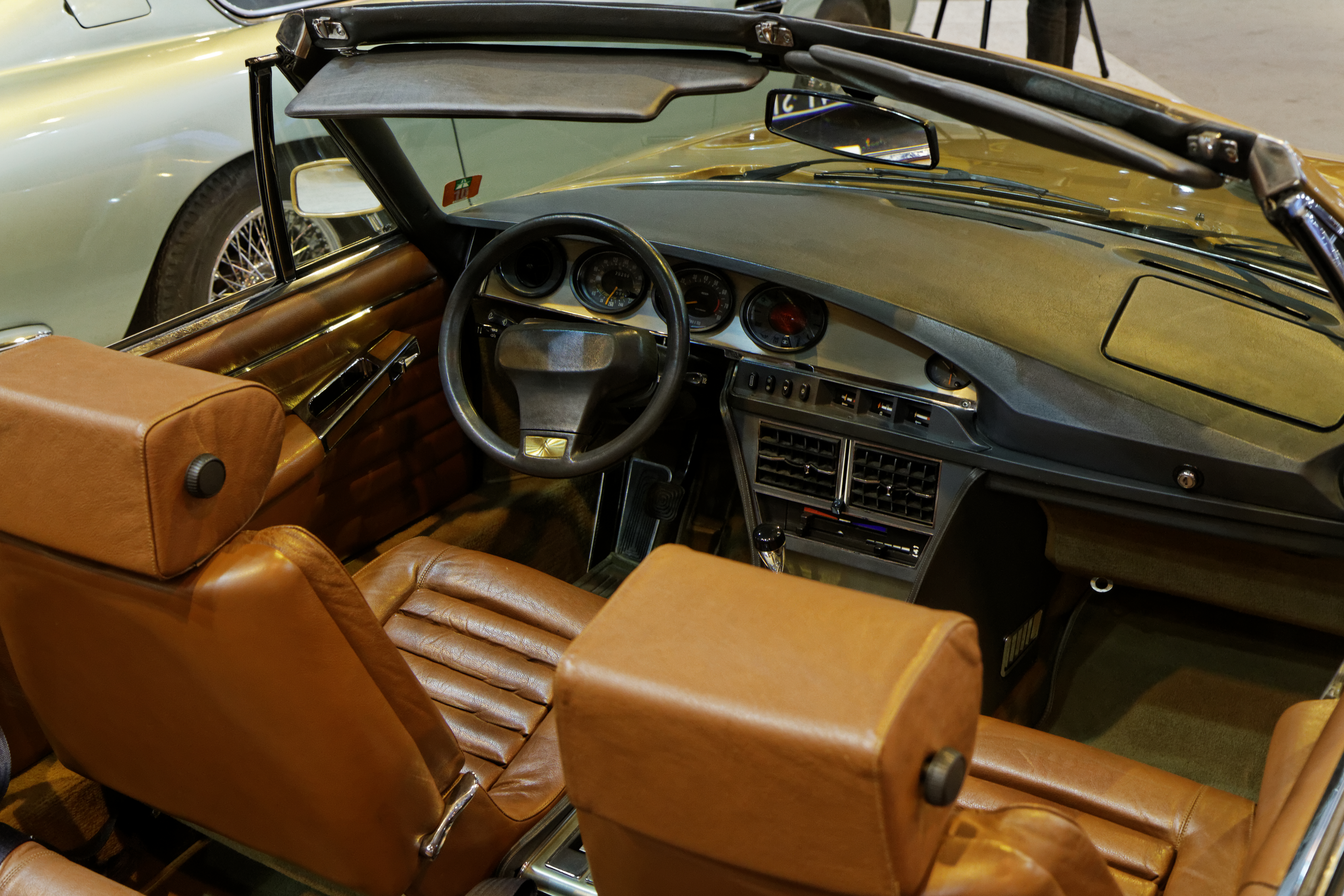 Une Citroën SM Mylord Cabriolet Chapron exposée lors du salon Retromobile 2014